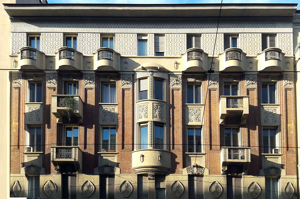 Edificio déco in via Cibrario (Torino)